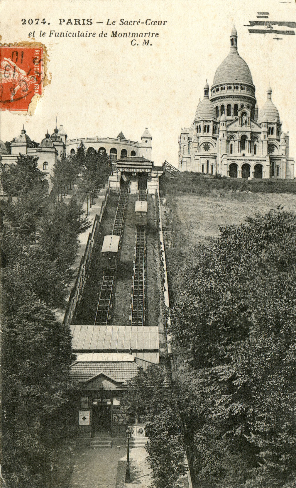 Funiculaire de Montmartre et le Sacré Coeur